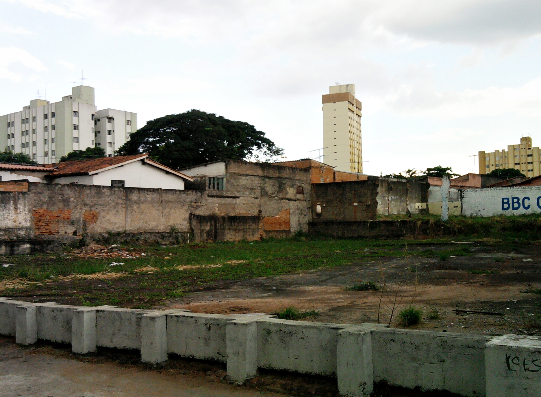 Rua 26A - Goiânia - Goiás - Brasil